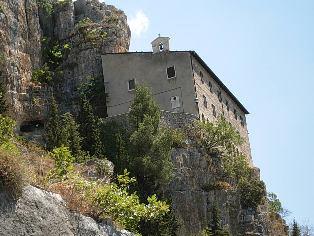 Eremo di Sant'Onofrio al Morrone Foto personale concessa in PD